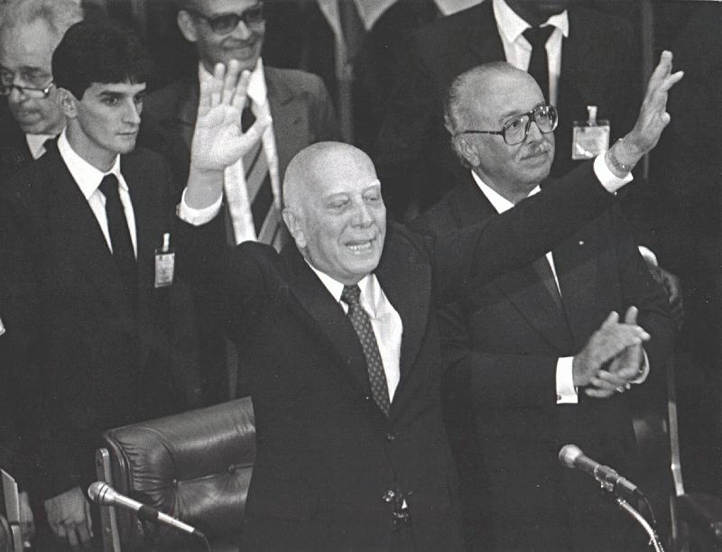 Brasília - O ex-deputado federal Ulysses Guimarães, o "Senhor Diretas", defende no plenário da Câmara a redemocratização do Brasil.